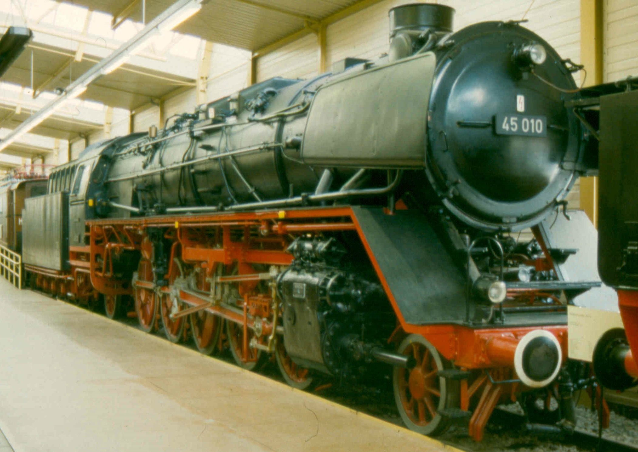 Dampflok 45 010 der Deutschen Bundesbahn, Aufnahme vom 15. April 2001 im DB-Museum Nürnberg von Fritz Ferstl